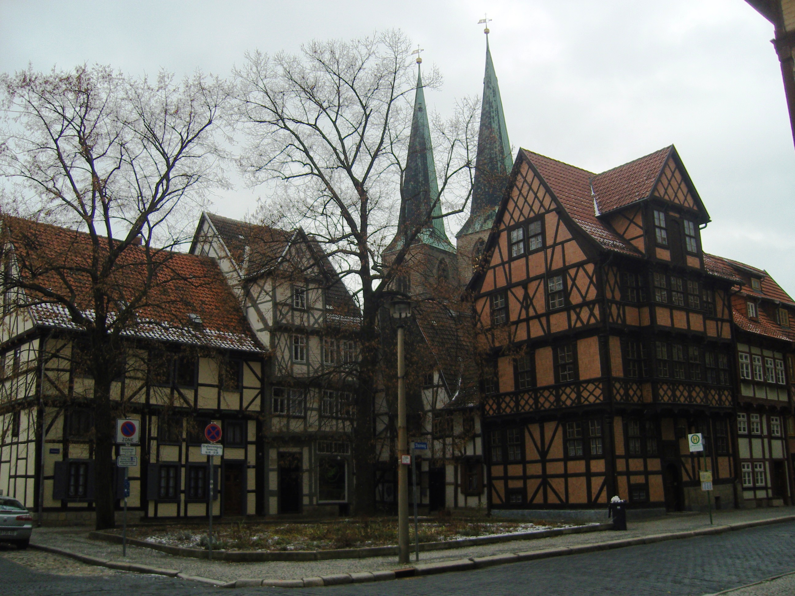 Fachwerkhäuser Steinweg in Quedlinburg; aufgenommen aus der Reichenstraße